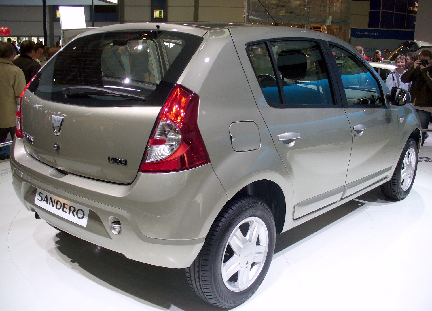 Dacia Sandero